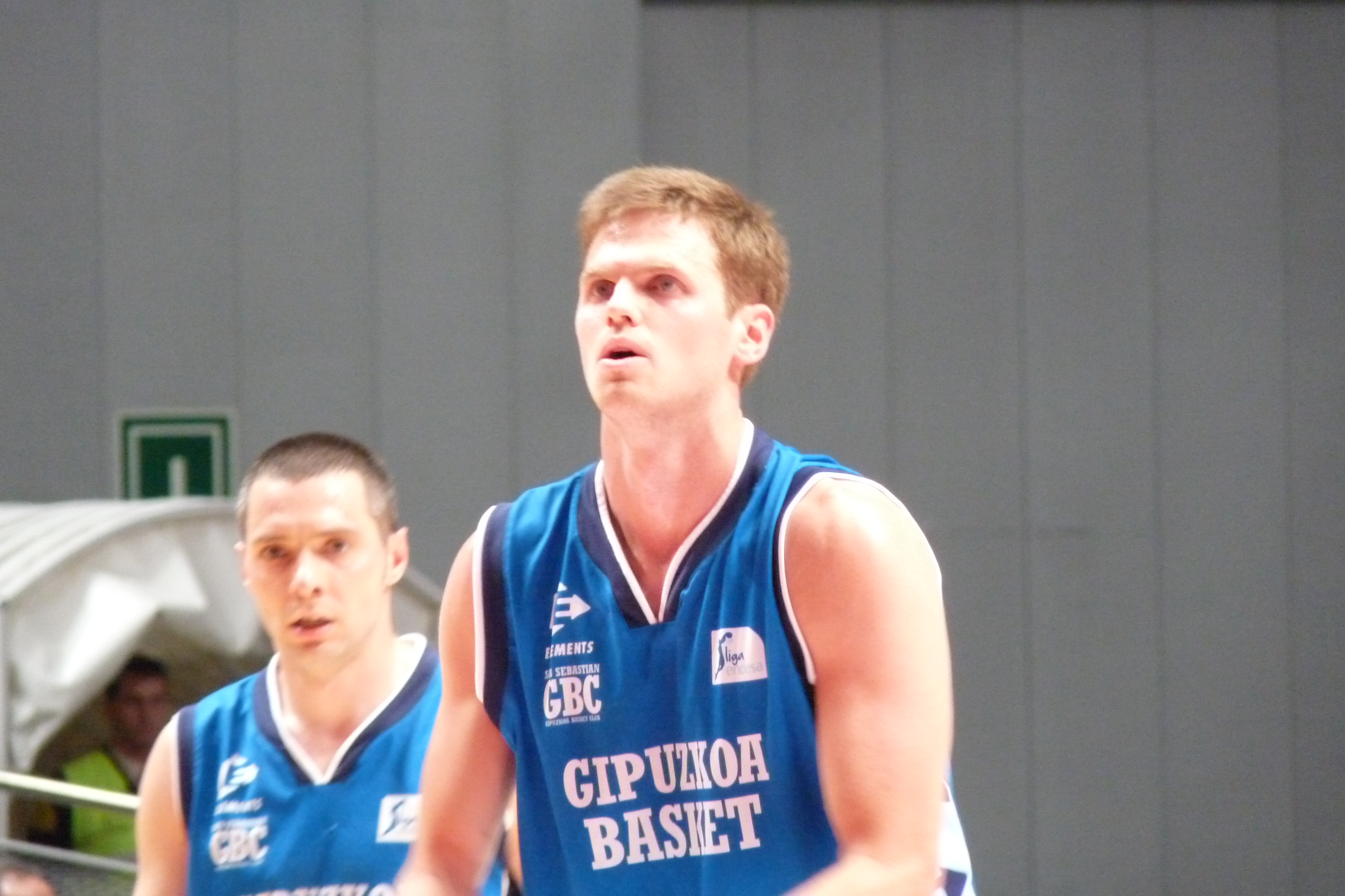 Will Hanley en partido Real Madrid-San Sebastián, año 2014